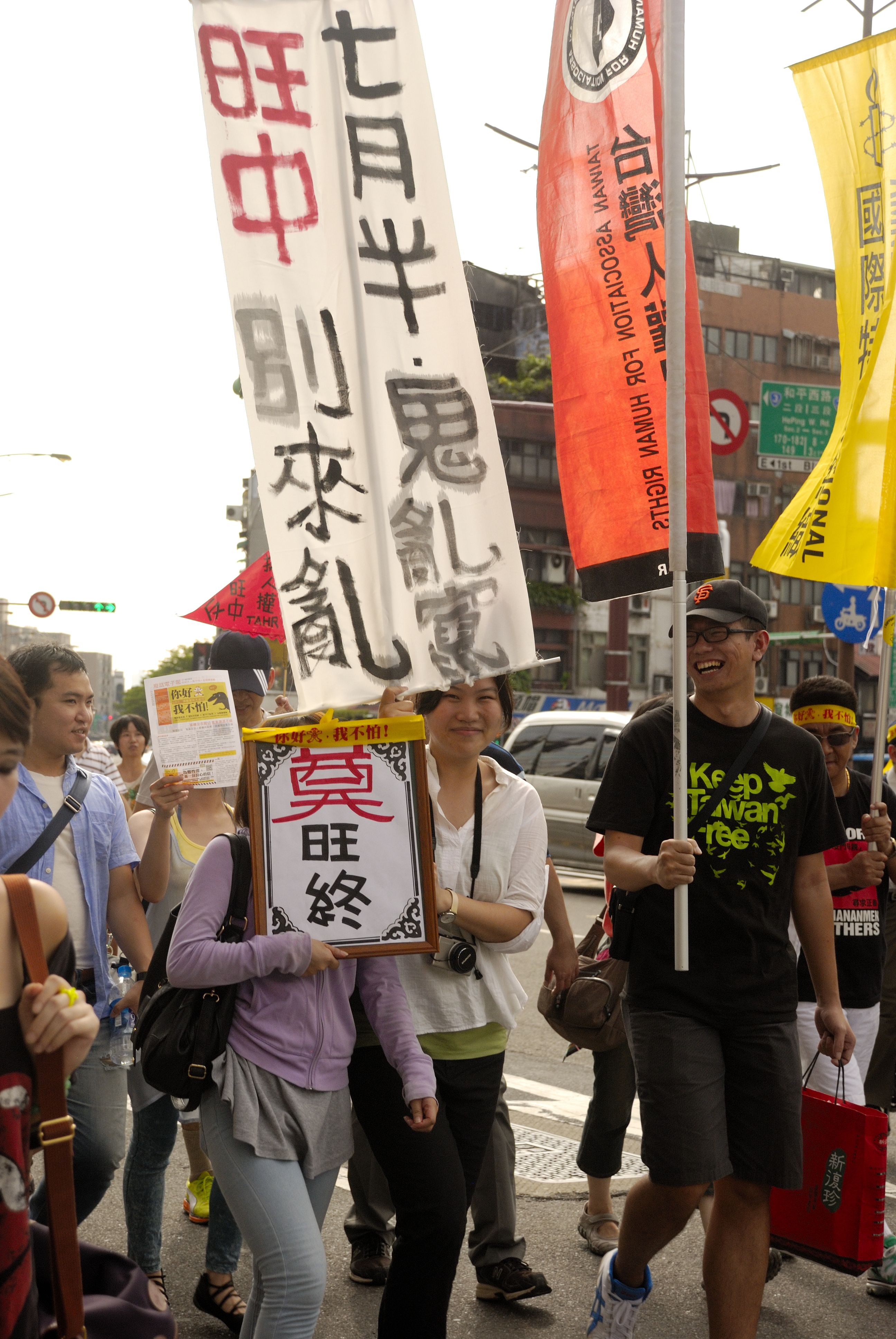 媚中旺旺別來亂!